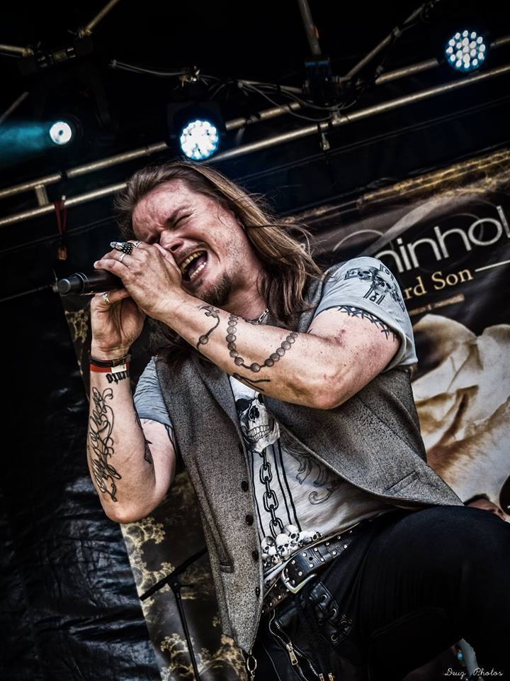 Kévin Kazek, chanteur du groupe Seyminhol lors du Rock'n'Roll Train Festival le 09 juillet 2016